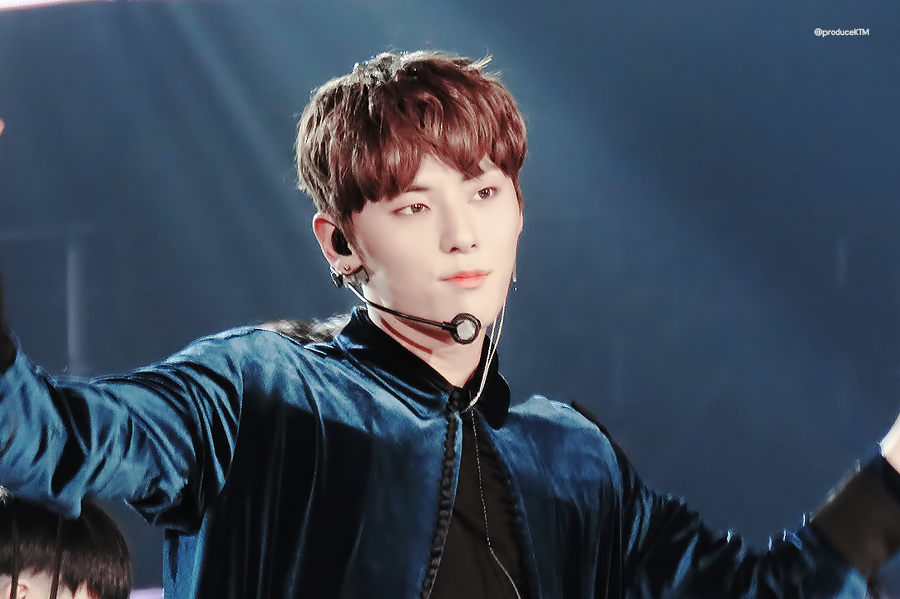 2016 슈퍼드림콘서트